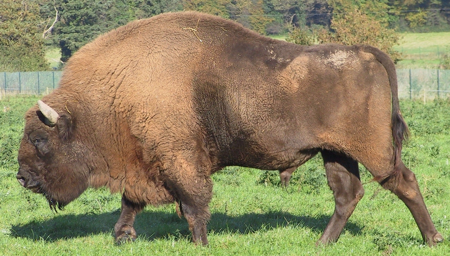 European Bison